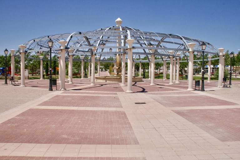 Zona central del Parque Ferial de Tarancón